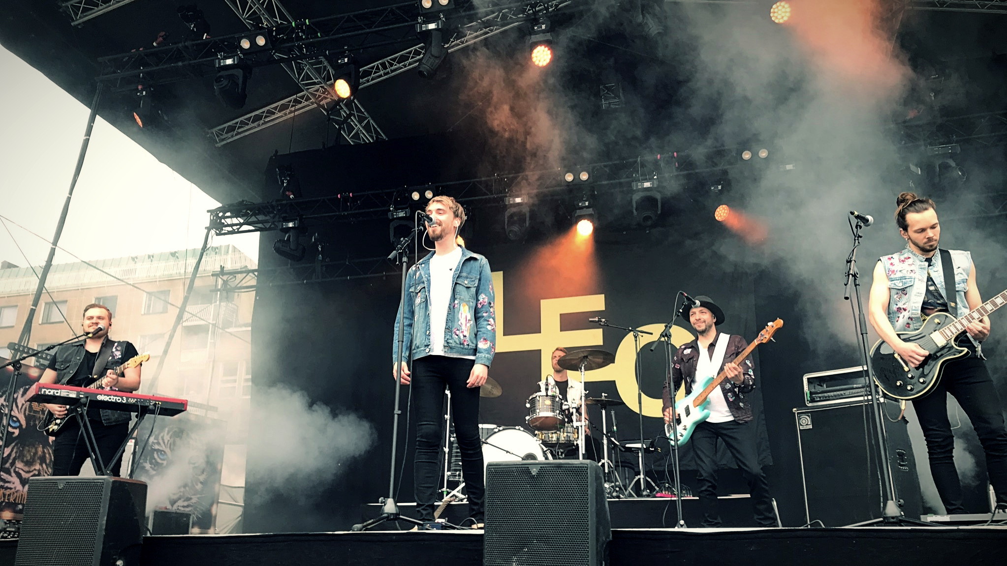 Leo Stillman esiintymässä Kotka Soi -tapahtumassa 14. kesäkuuta 2019.